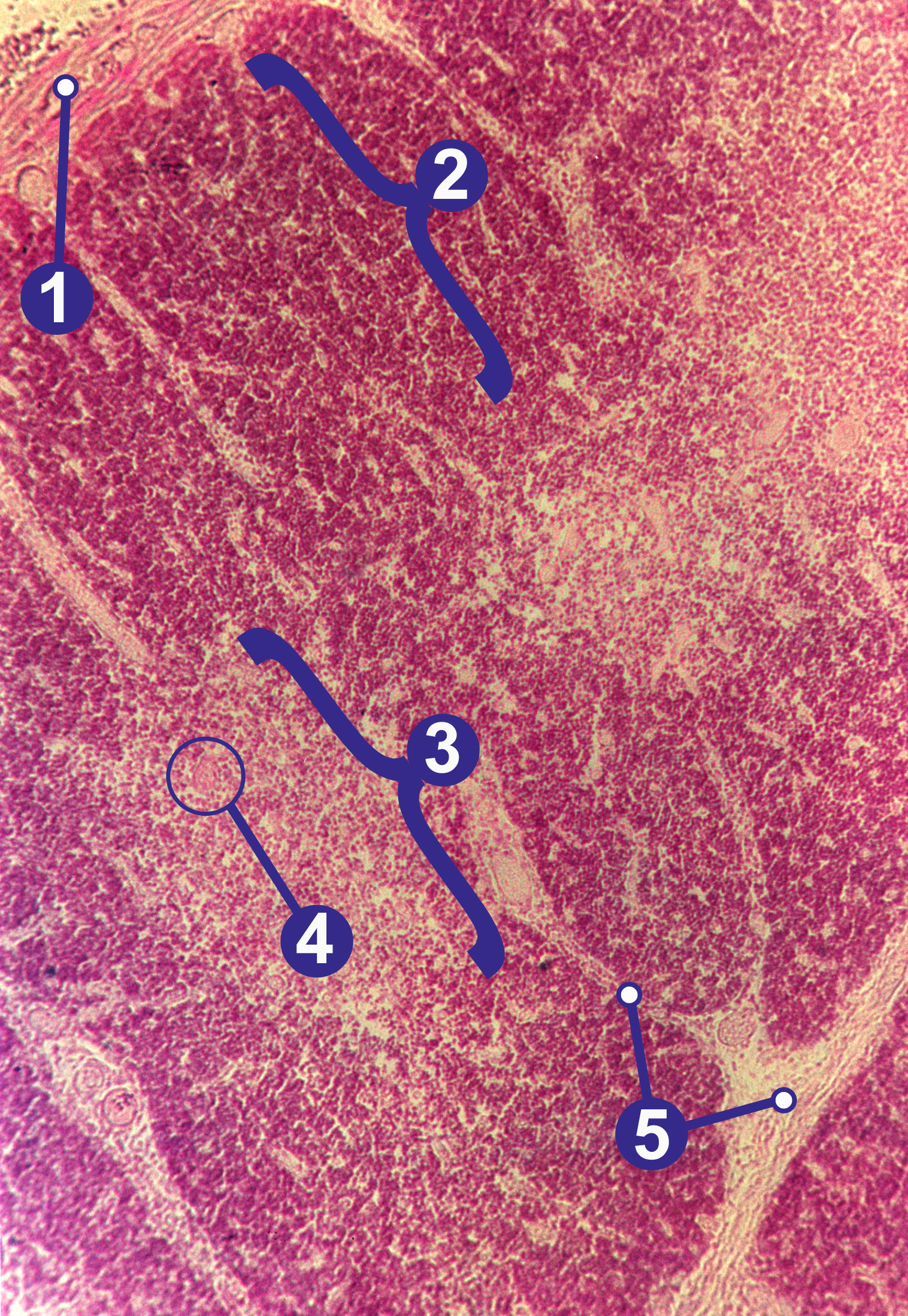 Histologisches Präparat eines menschlichen Thymus mit typischer Läppchen-Struktur, Hämatoxylin-Eosin-Färbung, Objektiv 56x: (1) Organkapsel, (2) Thymusrinde, (3) Thymusmark, (4) Hassall-Körperchen, (5) Bindegewebssepten